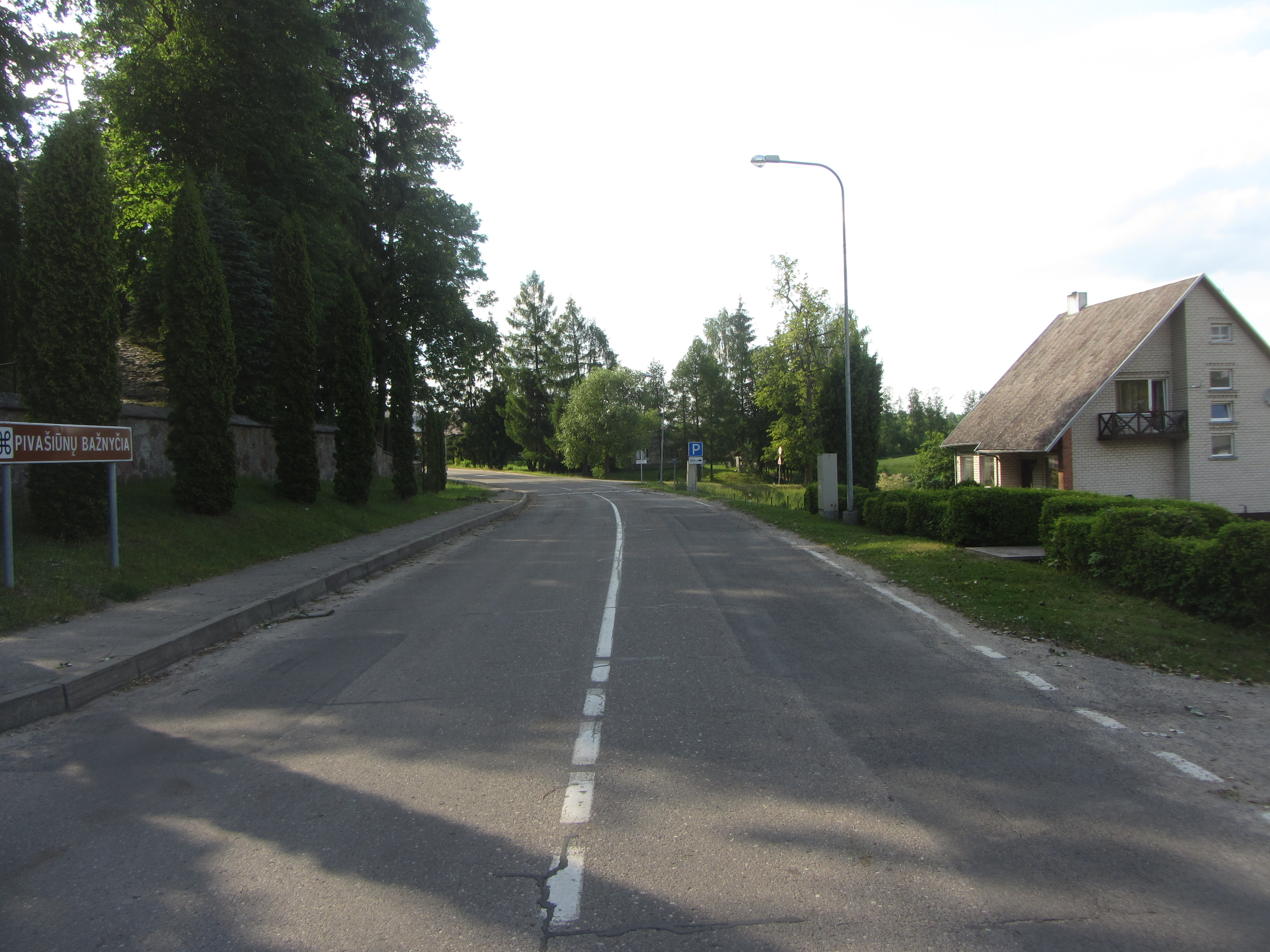 Pivašiūnai, Lithuania